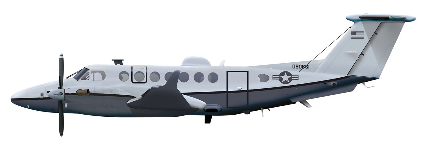 Beechcraft King Air 350ER désignation USAirForce MC12W Huron